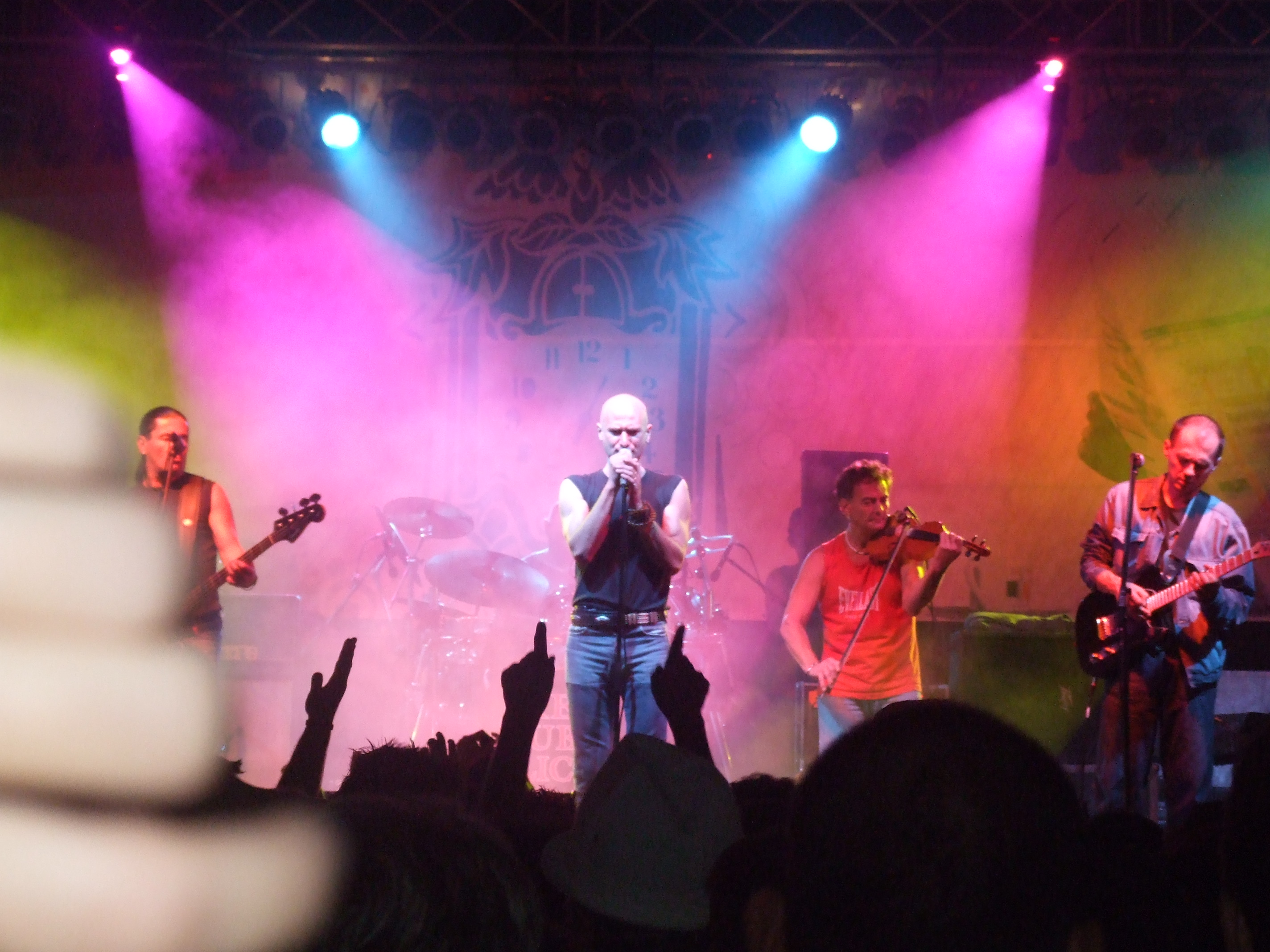 2007 szeptember 2-án a Republic Marosvásárhelyen koncertezett,ez alkalomból készult a felvétel